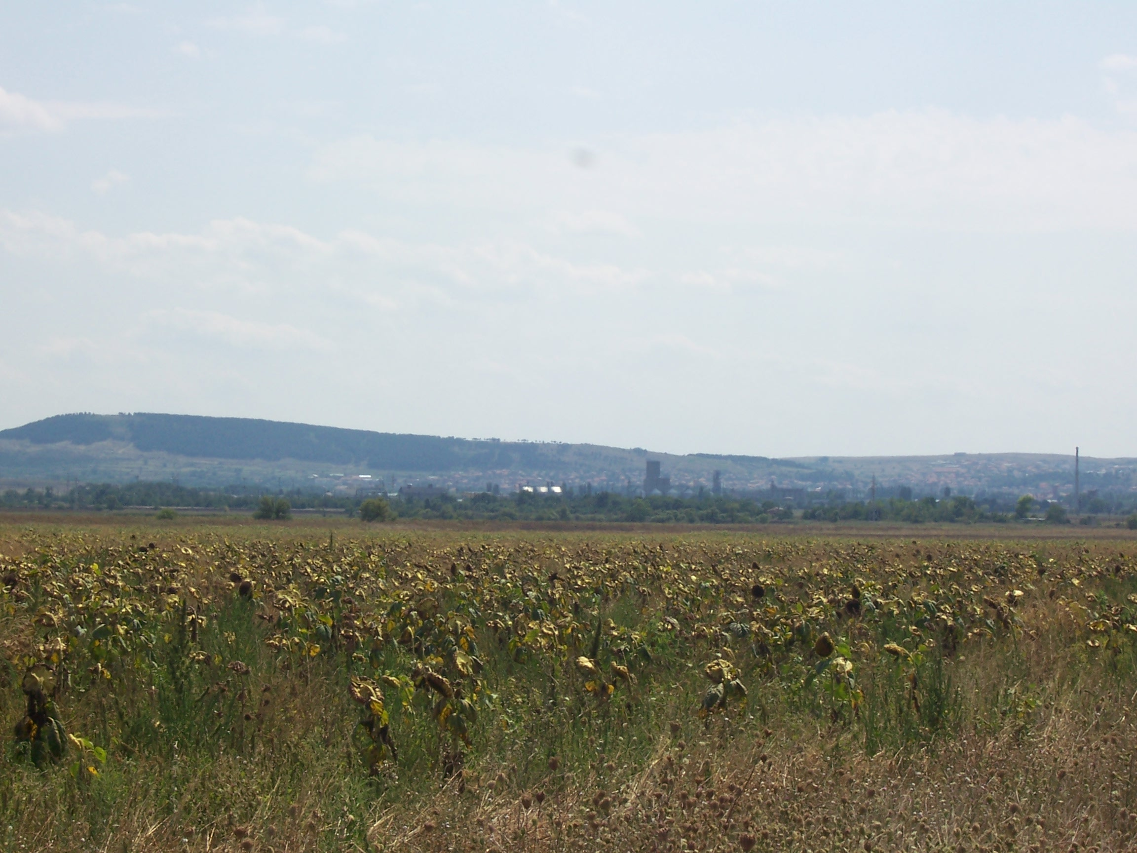 част от Карнобатската котловина с изглед към гр.Карнобат и Бакъджишко-Хисарския дял на Средна гора; © 2006 Димитър Колев